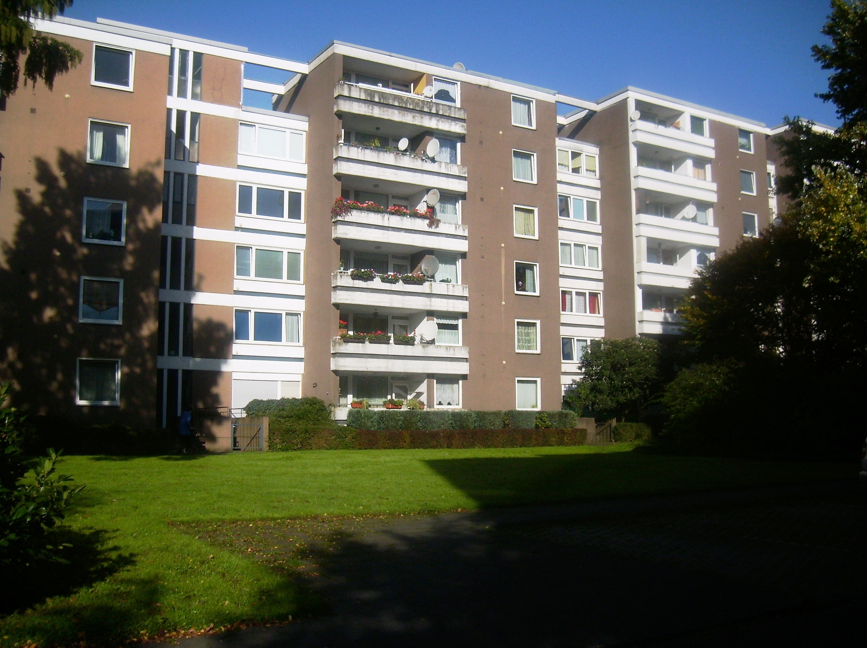 Wohnblock an der Oskar-Schlemmer-Straße